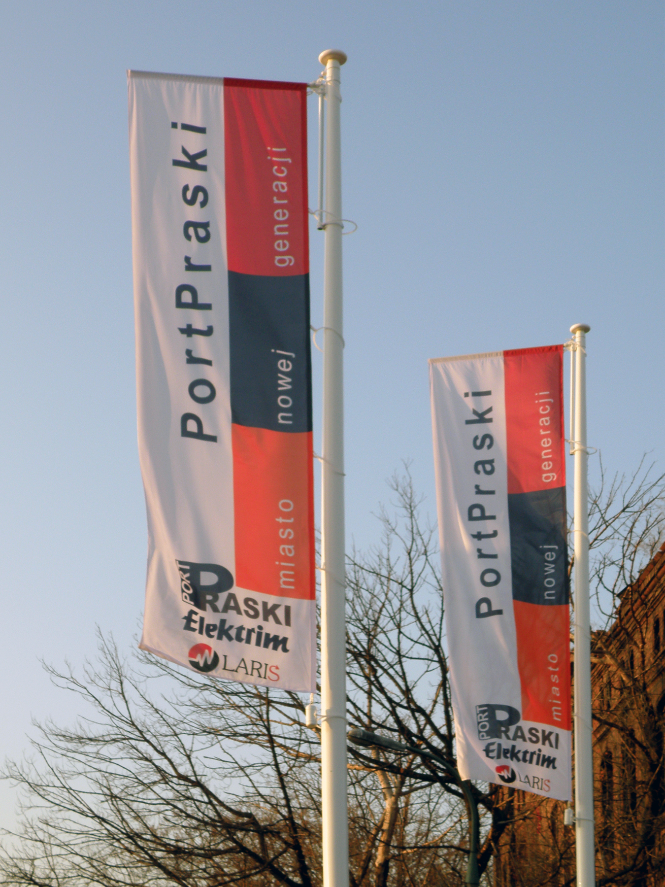 Warszawa, Port Praski - port nad Wisłą na terenie dzielnicy Praga Północ.